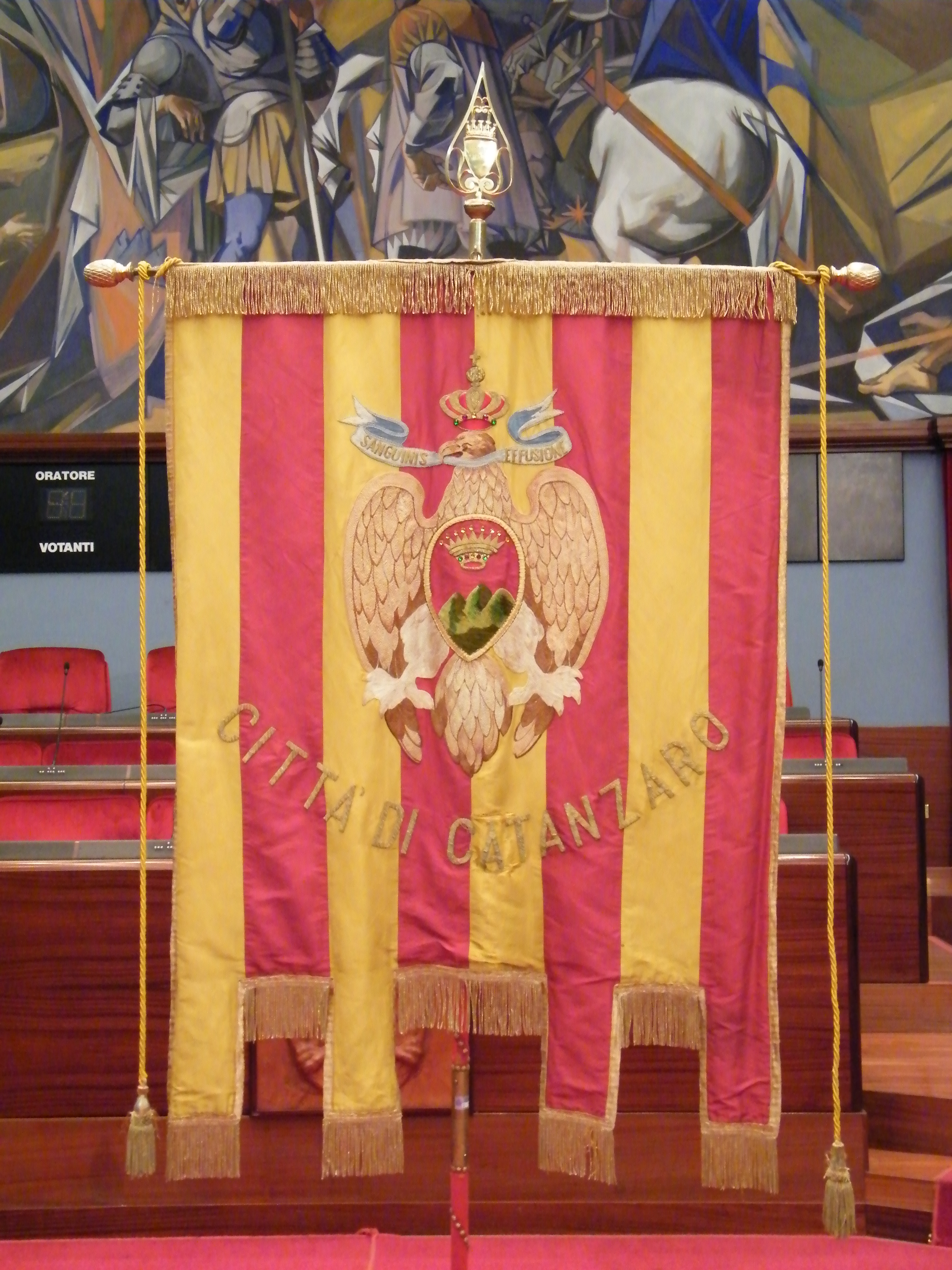 Gonfalone della città di Catanzaro